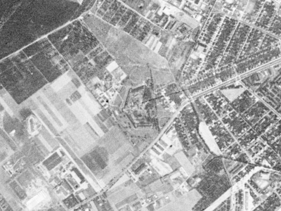 Fort VIIa Twierdzy Poznań sfotografowany przez satelitę KH-4A 1023, 23 sierpnia 1965 r.